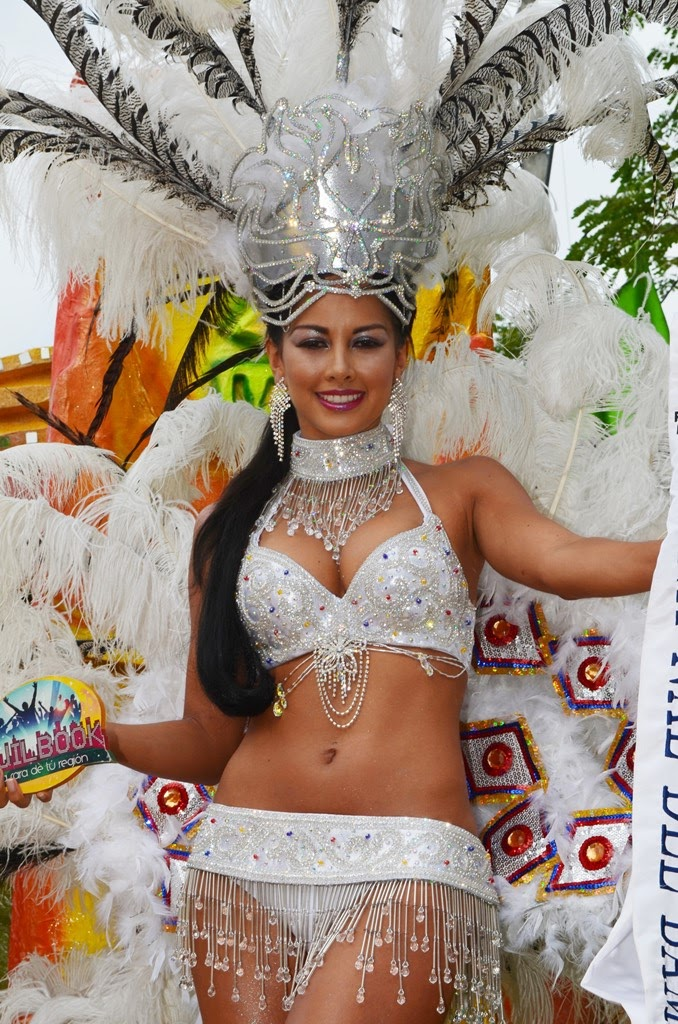 Paola Andrea Novoa Zambrano, Reina del Festival Folclórico y Reinado Nacional del Bambuco de 2012